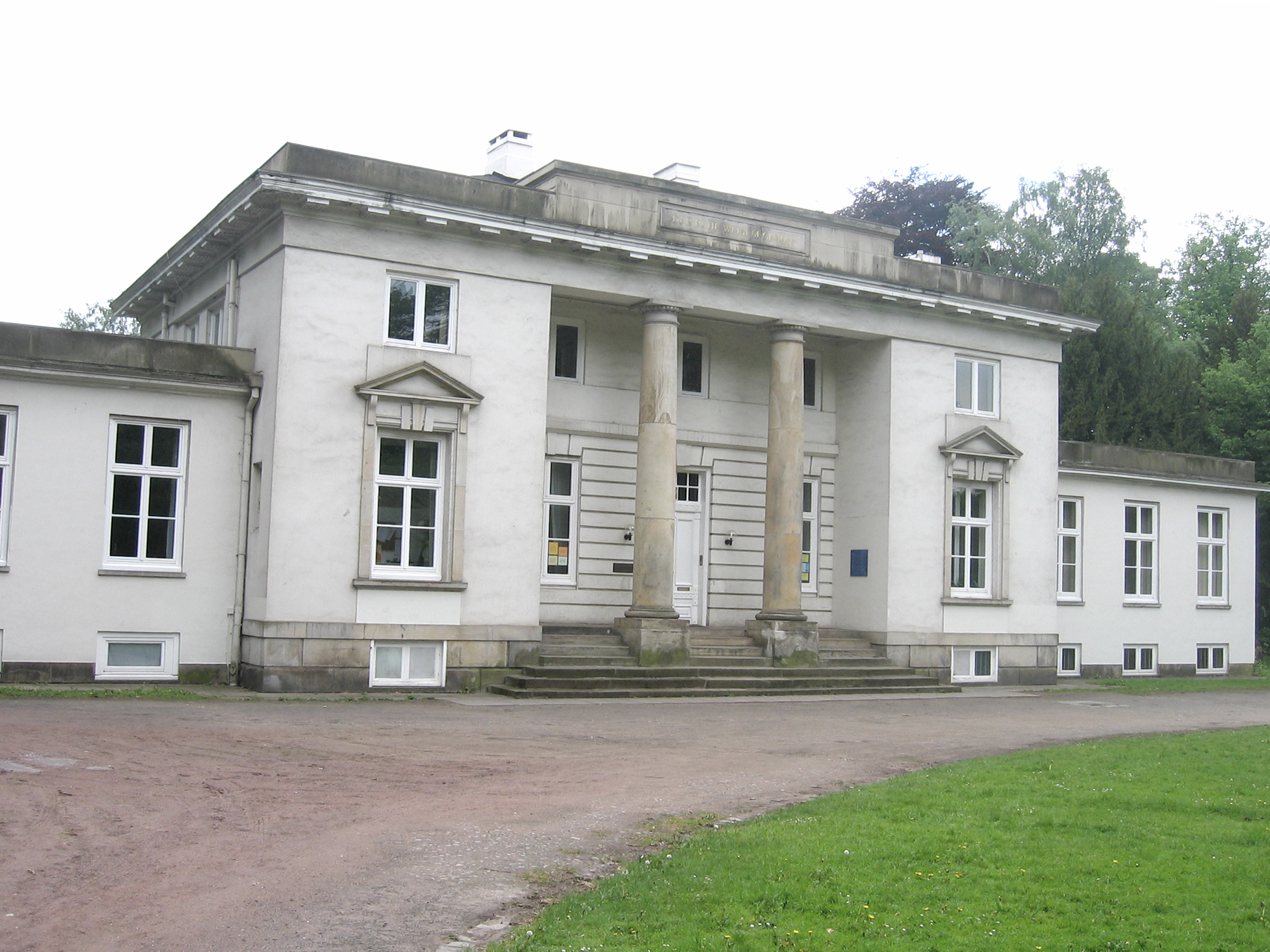 Landhaus J.C. Godeffroy This is a photograph of an architectural monument.